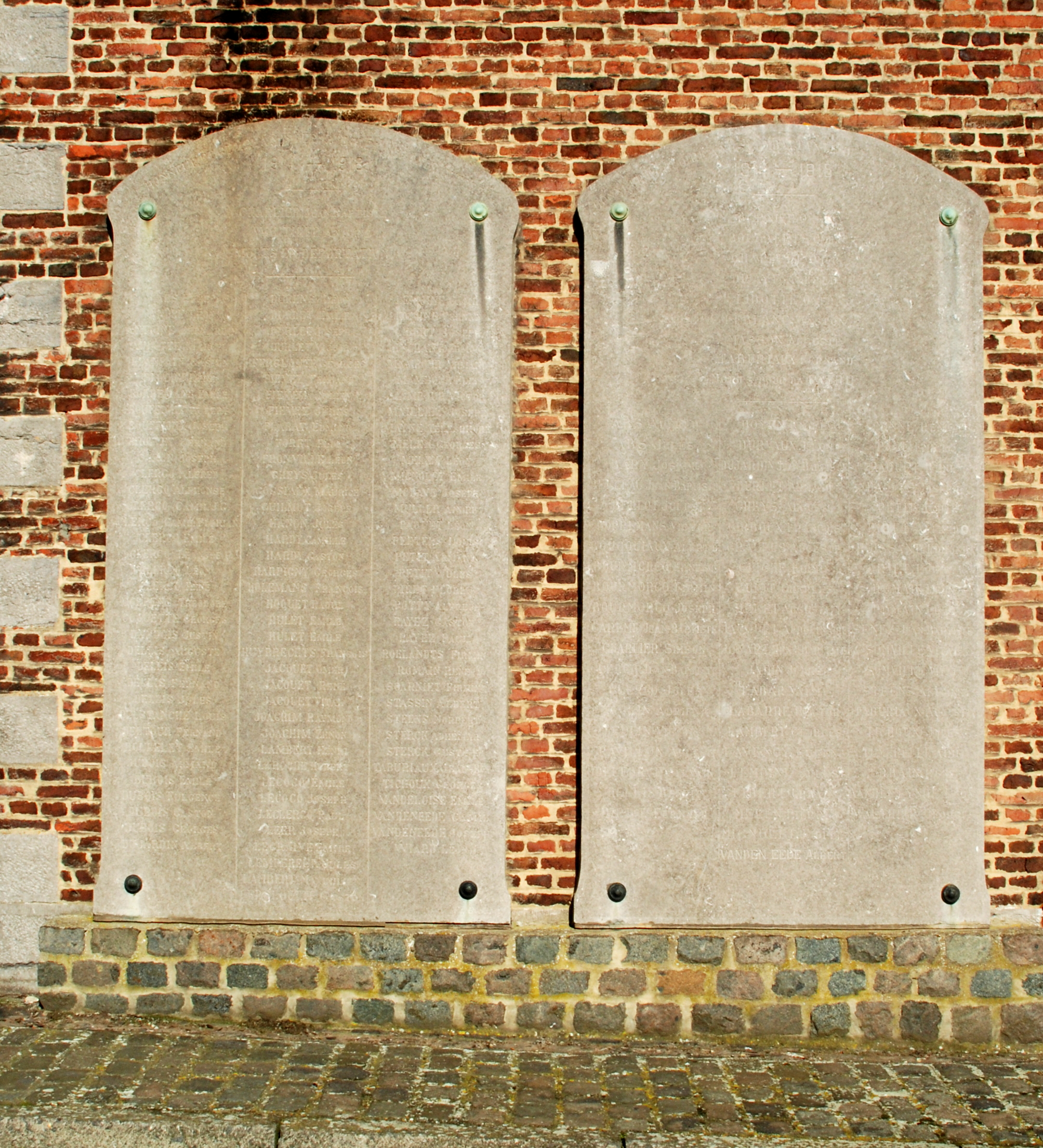 Belgique - Brabant wallon - Genappe - Baisy-Thy - Église Saint-Hubert